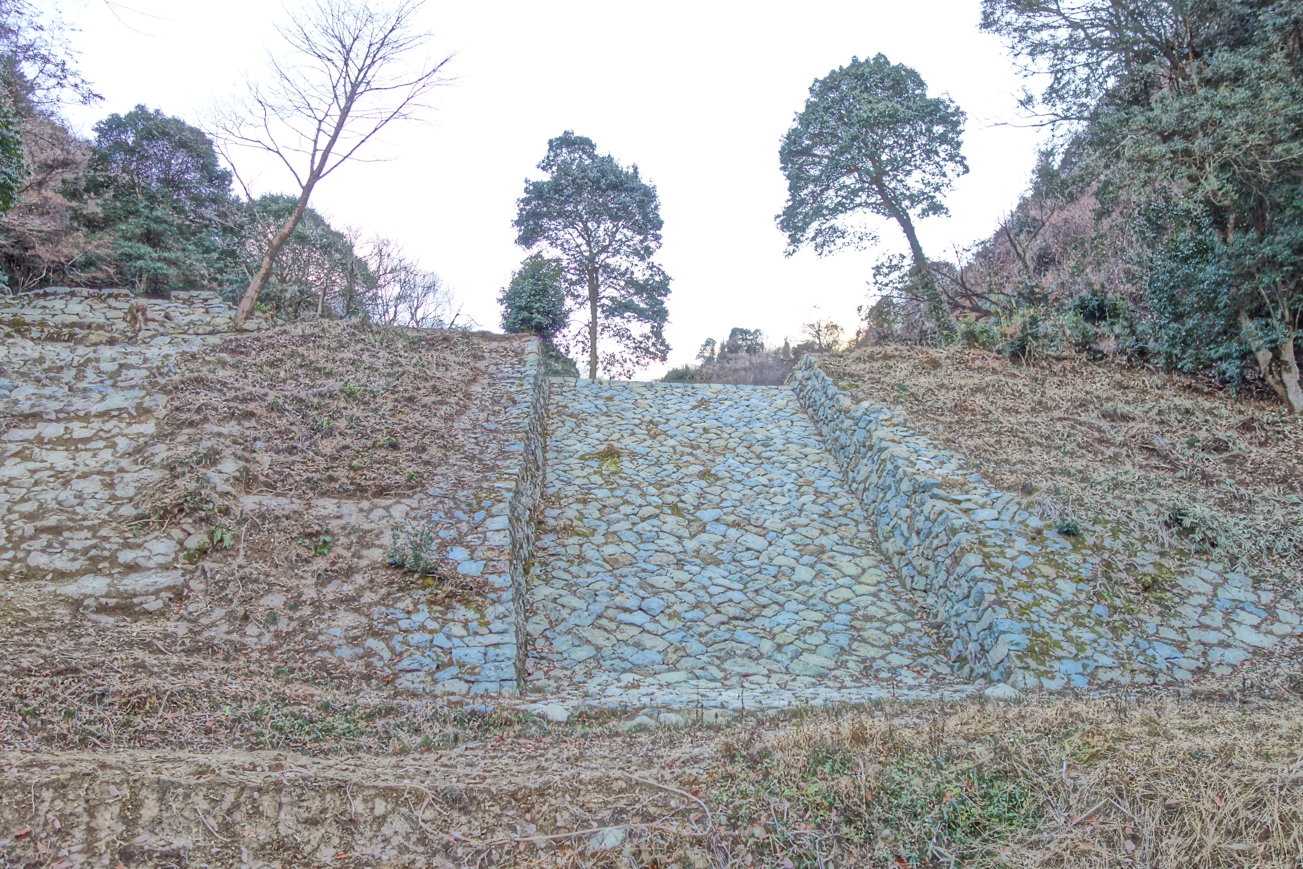 広島県福山市芦田町の別所砂留の7番砂留。別所砂留群の中でも、形状が整った砂留。